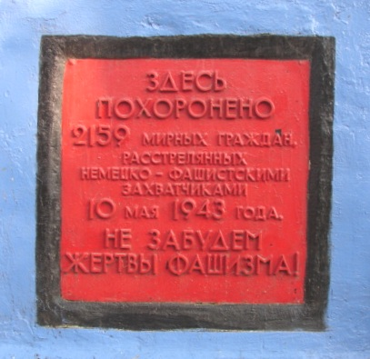 Надпись на памятнике евреям - жертвам Холокоста в деревне Василишки Щучинского района Гродненской области. Памятник установлен в 1967 году.